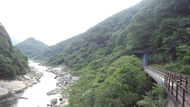 京都府笠置町を流れる木津川です。尚、右手に見えますのは、JRの関西線です。